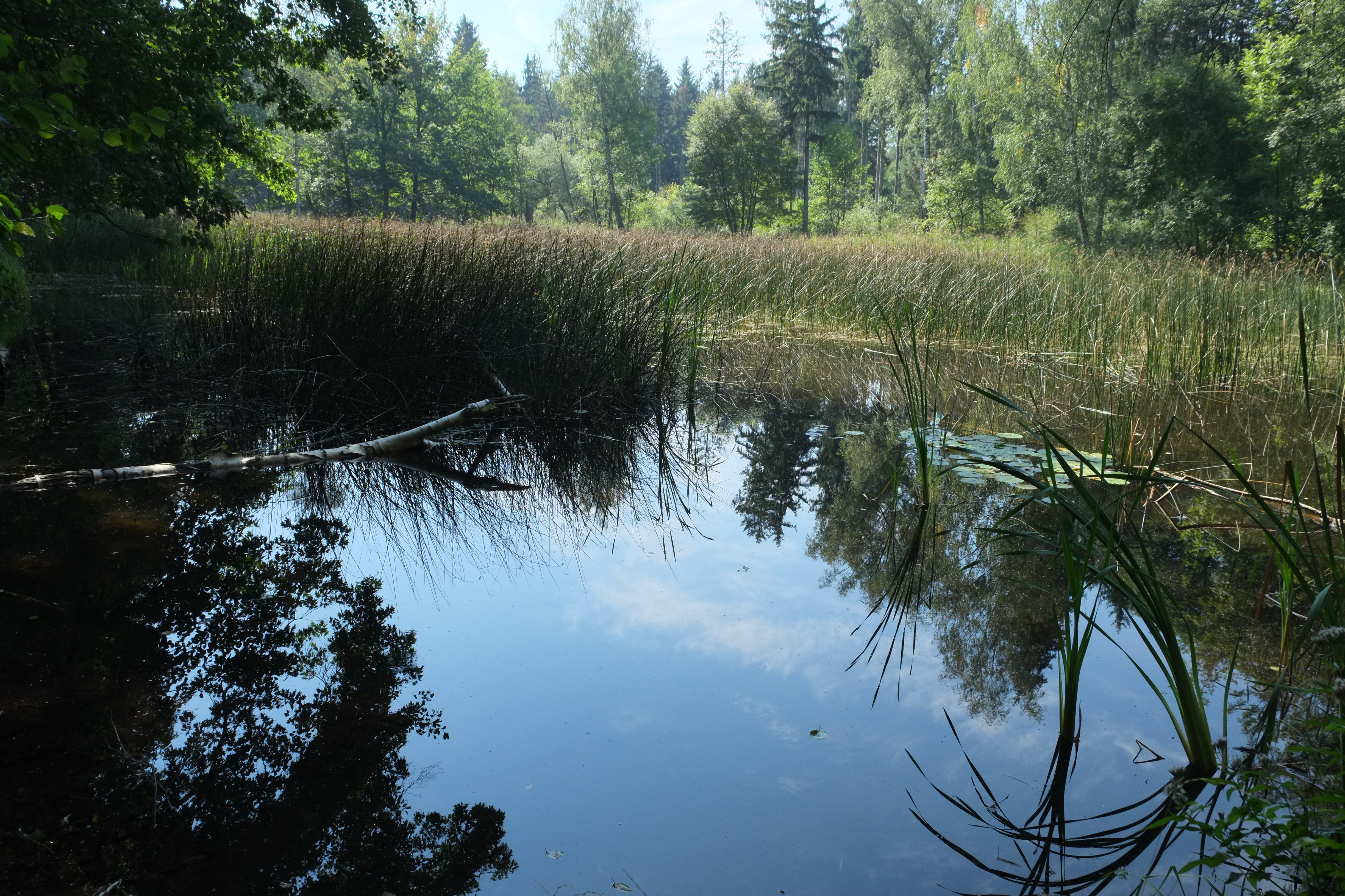 Evropsky významná lokalita Kerské rybníčky, významné místo rozmnožování pro čolka velkého.